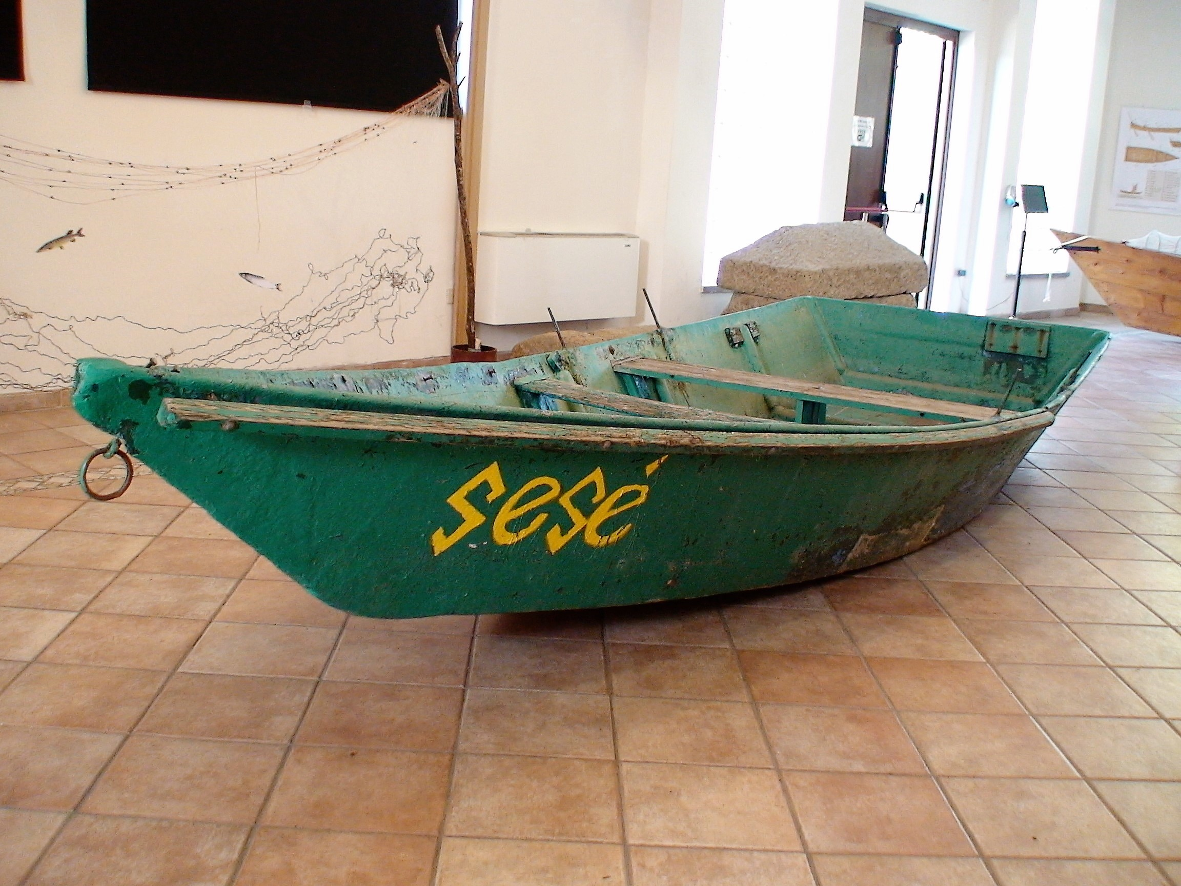 La barca a punta, tipica della zona di Trevignano Romano, è molto simile alla barca tradizionale del lago di Bolsena, ma di dimensioni più contenute.